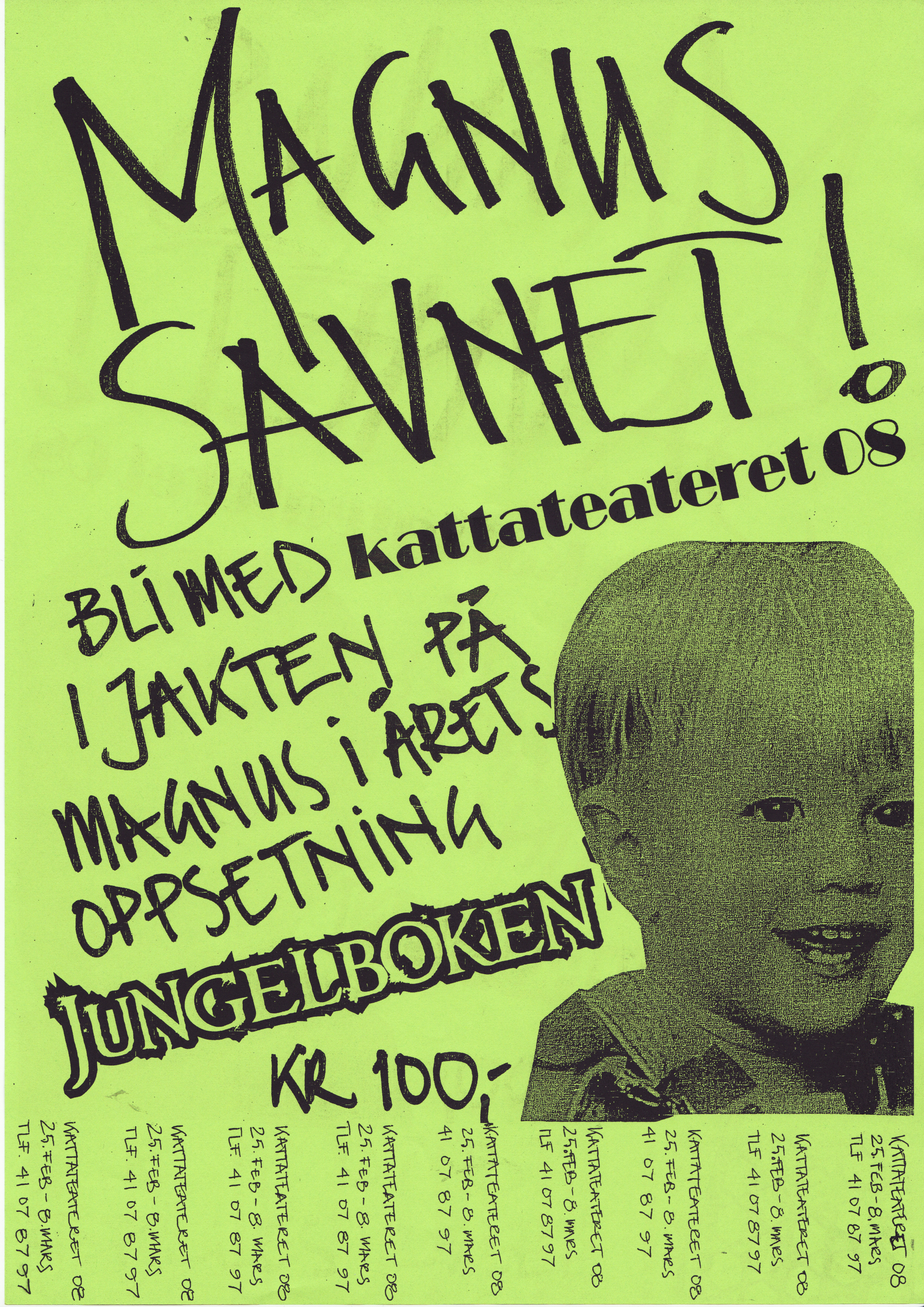 Plakaten til Kattateateret 08 - laget ved å skrive for hånd og kopiere. The poster of Kattateateret 08